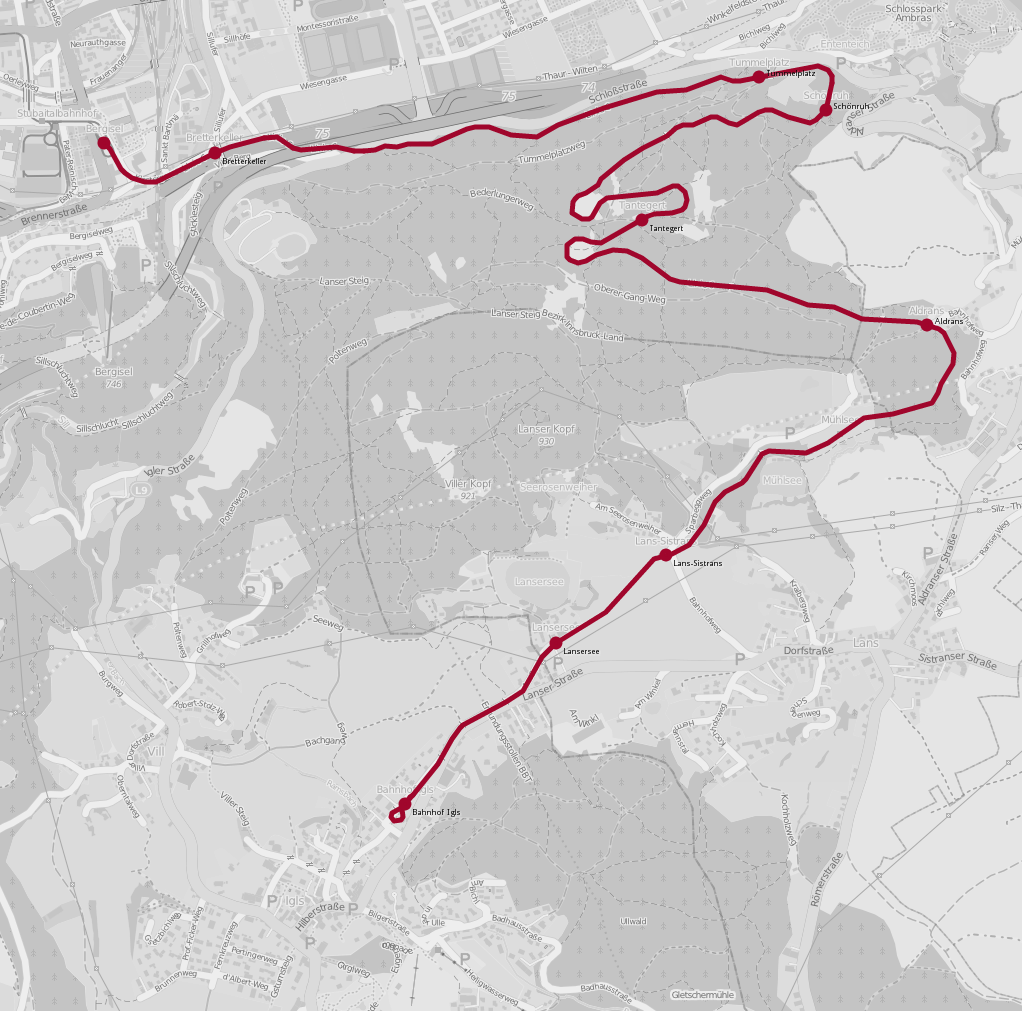 Netzplan Innsbrucker Mittelgebirgsbahn 2012 This map may be incomplete, and may contain errors. Don't rely solely on it for navigation.